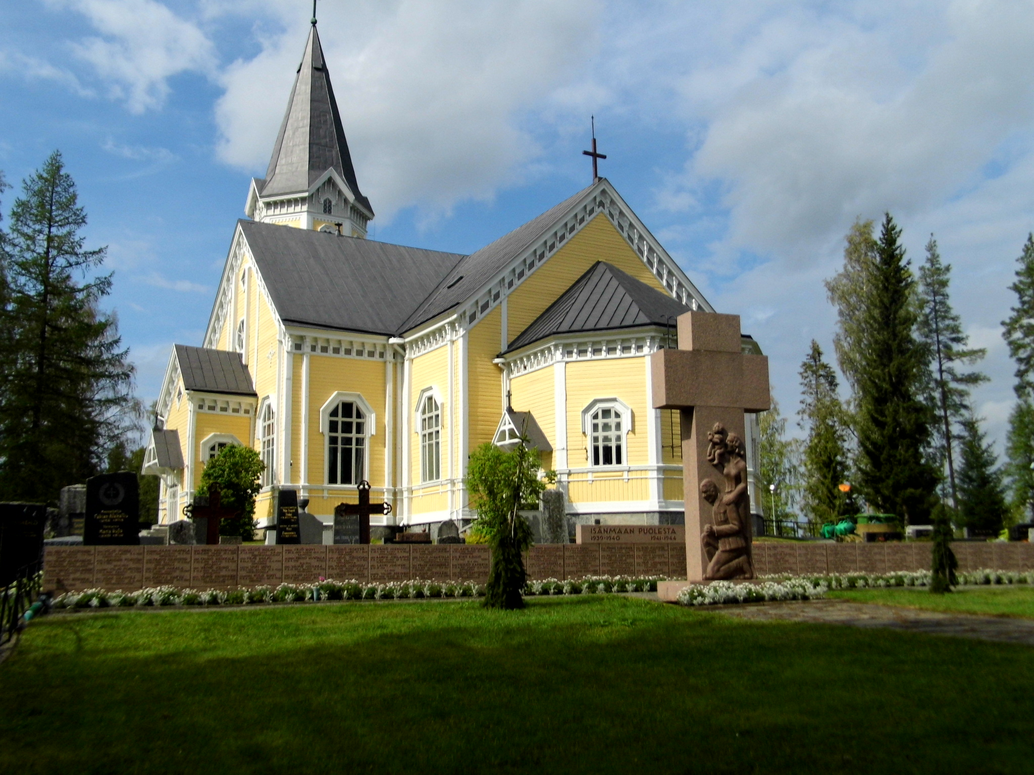 Siikaisten kirkko ja sankarihaudat kesällä 2014